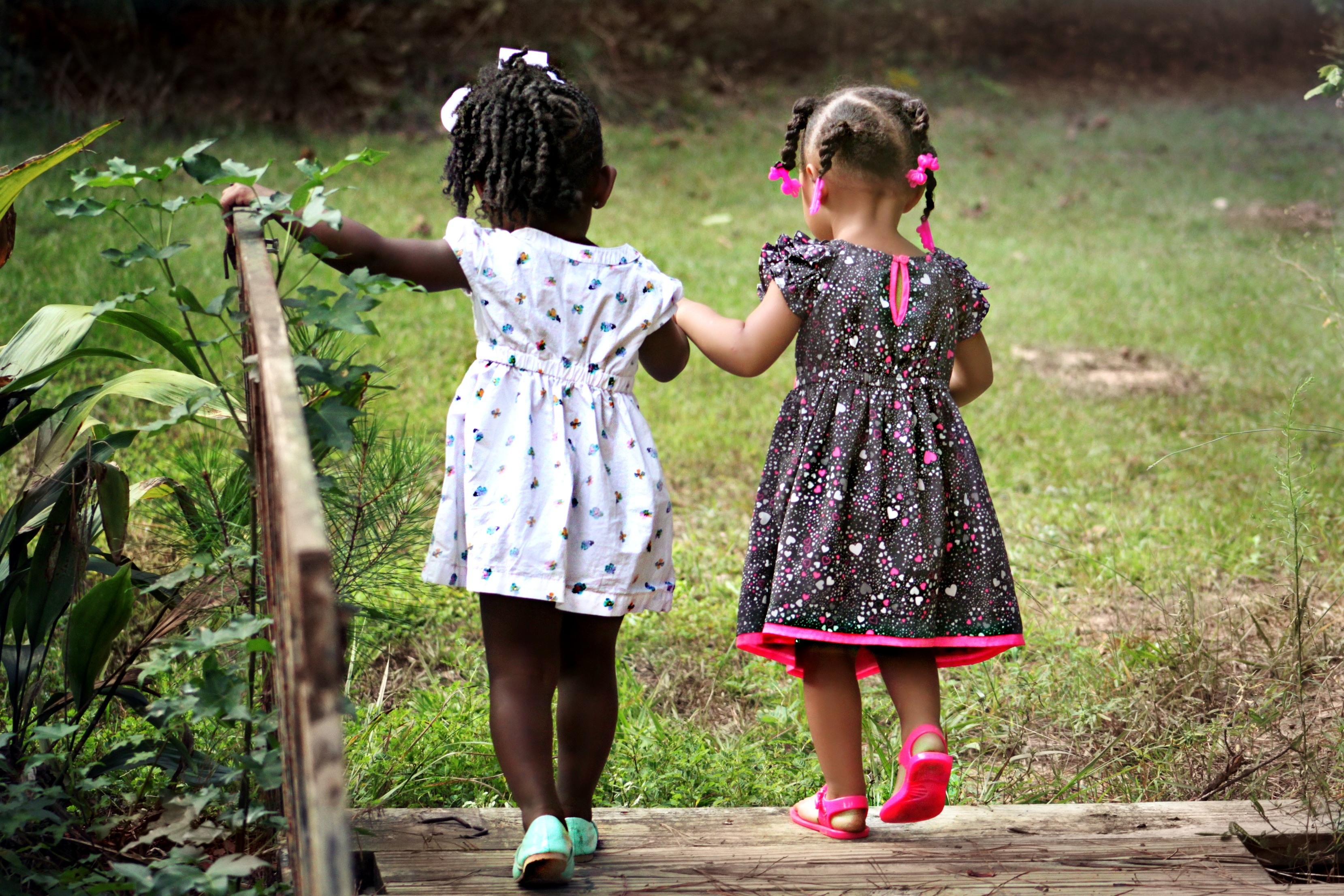 Dues nenes de diferents cultures.